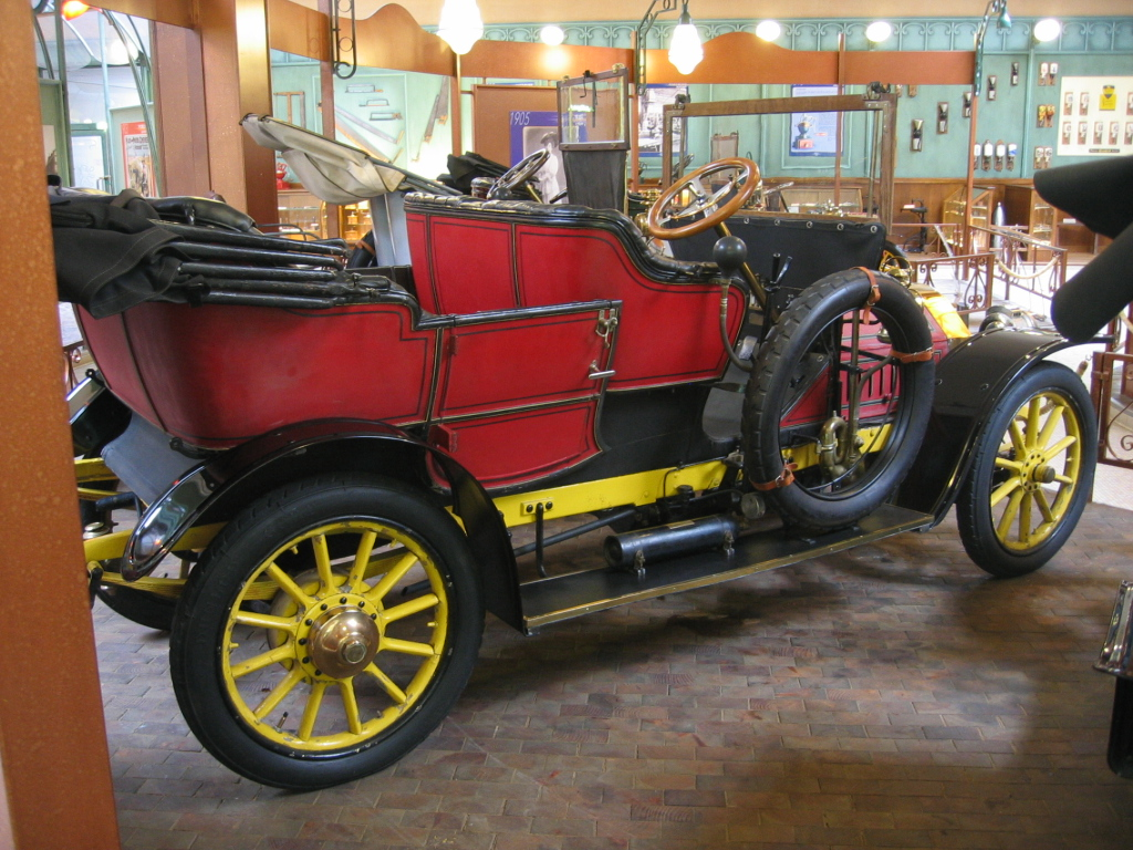 Peugeot Type 116 - Musée Peugeot Sochaux